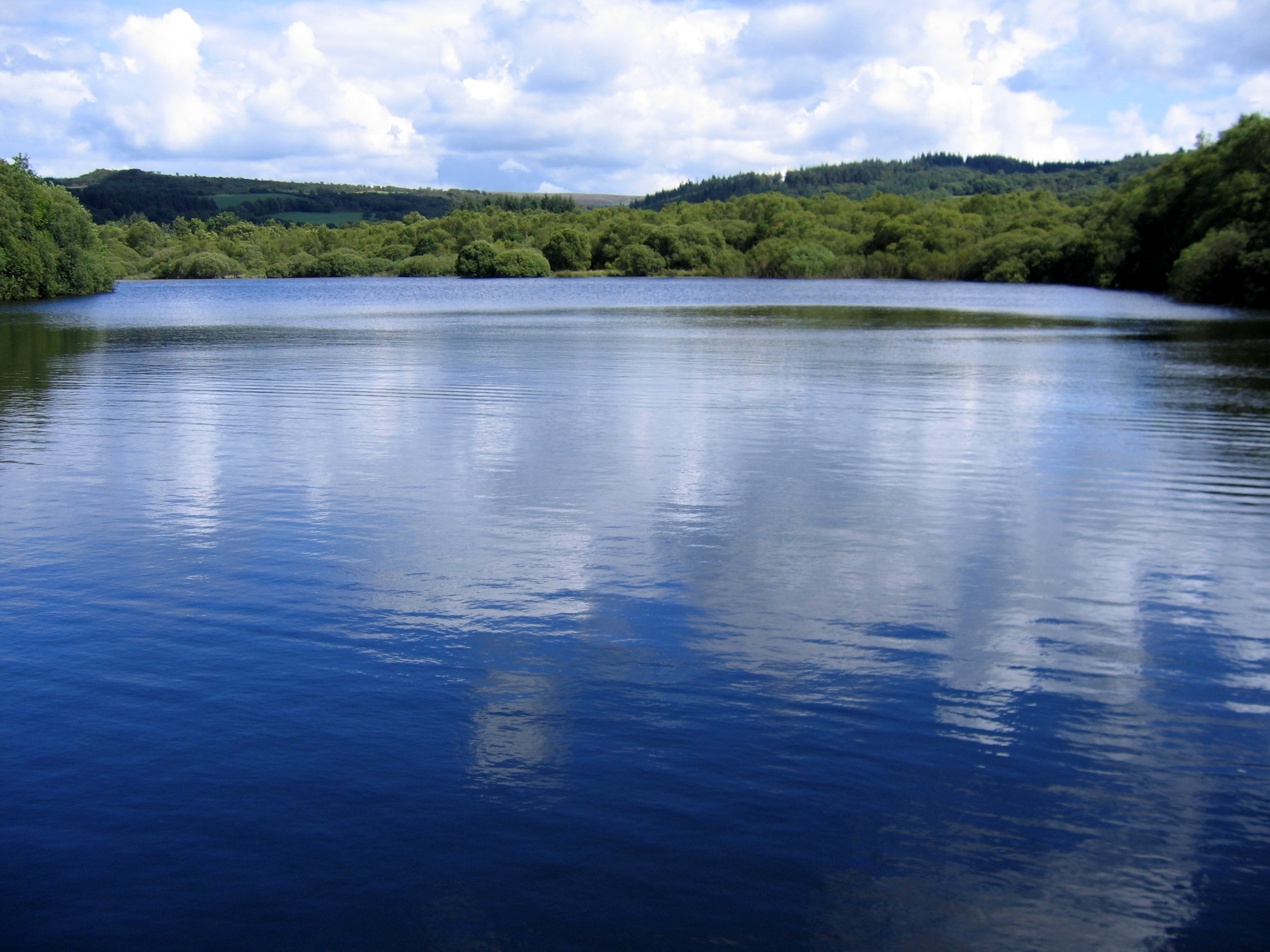 Vue du lac de Drennec